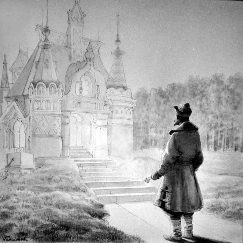 Illustration of the Russian fairy tale "The Scarlet Flower" ("Аленький цветочек"). Иллюстрация выполнена для альманаха "Волшебный фонарь"